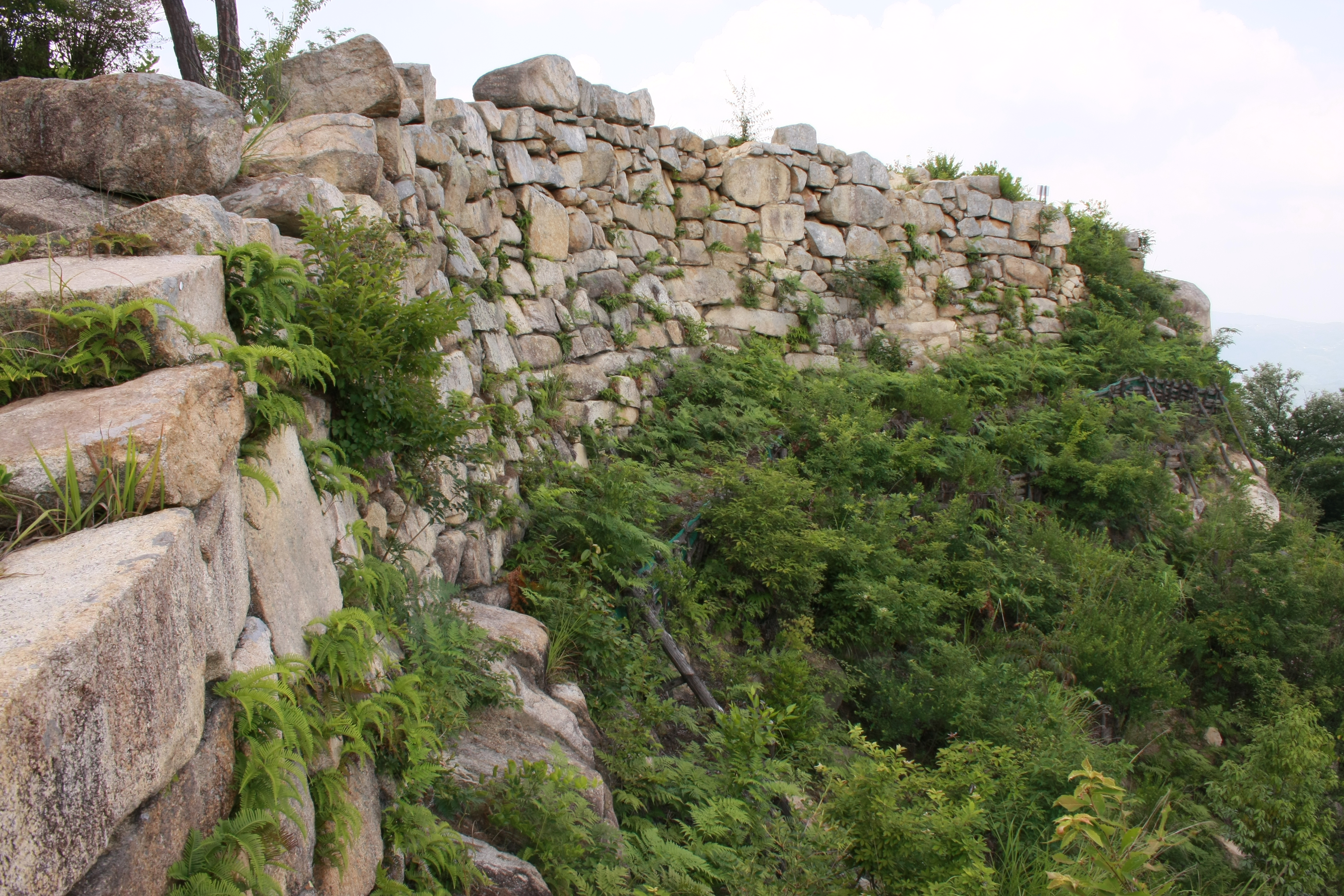 鬼ノ城の石垣